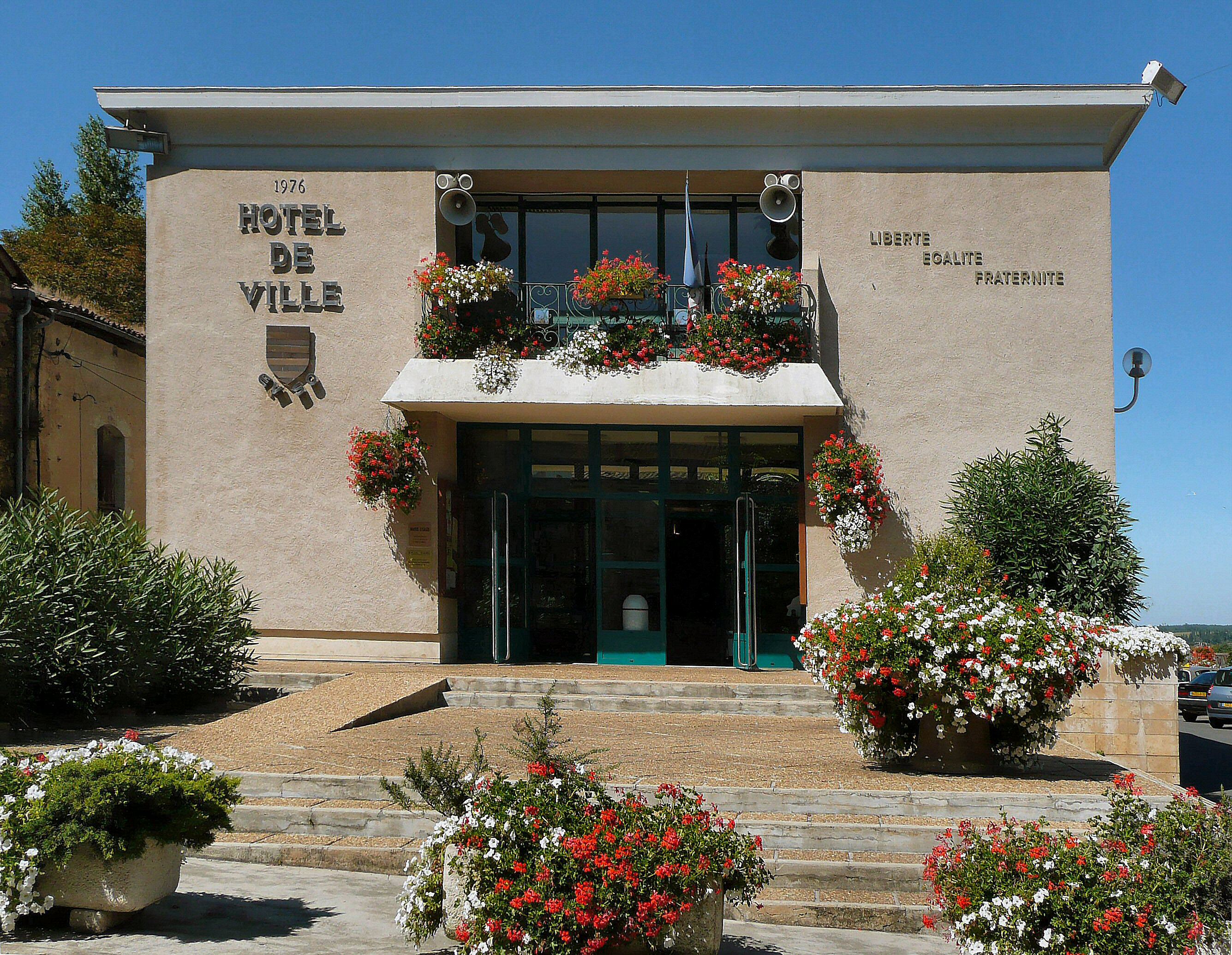 Hôtel de Ville d'Eauze (Gers)